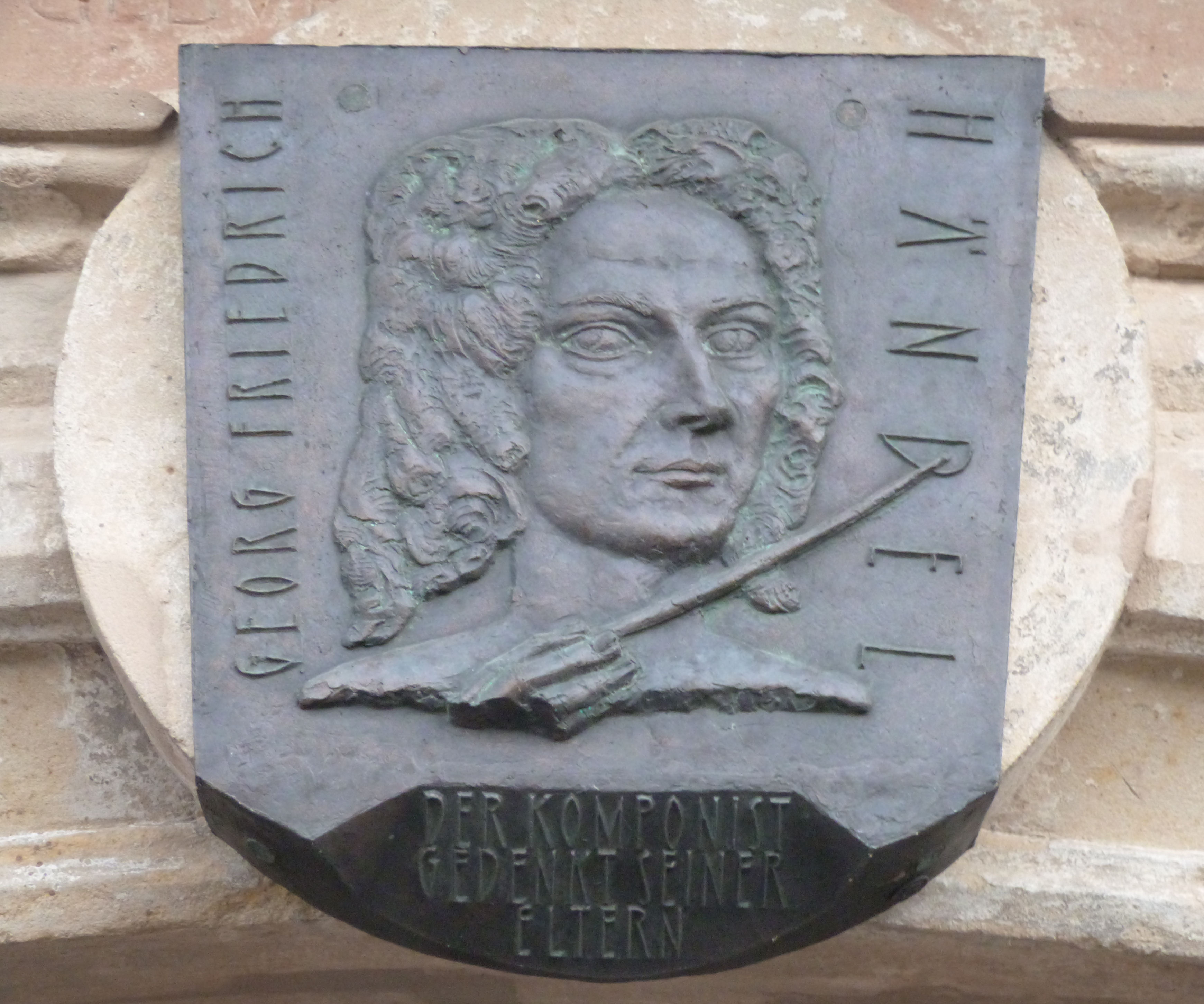 Stadtgottesacker Halle, rekonstruiertes Wappenschild mit dem Reliefporträt Georg Friedrich Händels von Bernd Göbel am Grabbogen 60, Familiengrab des Vaters Georg Händel